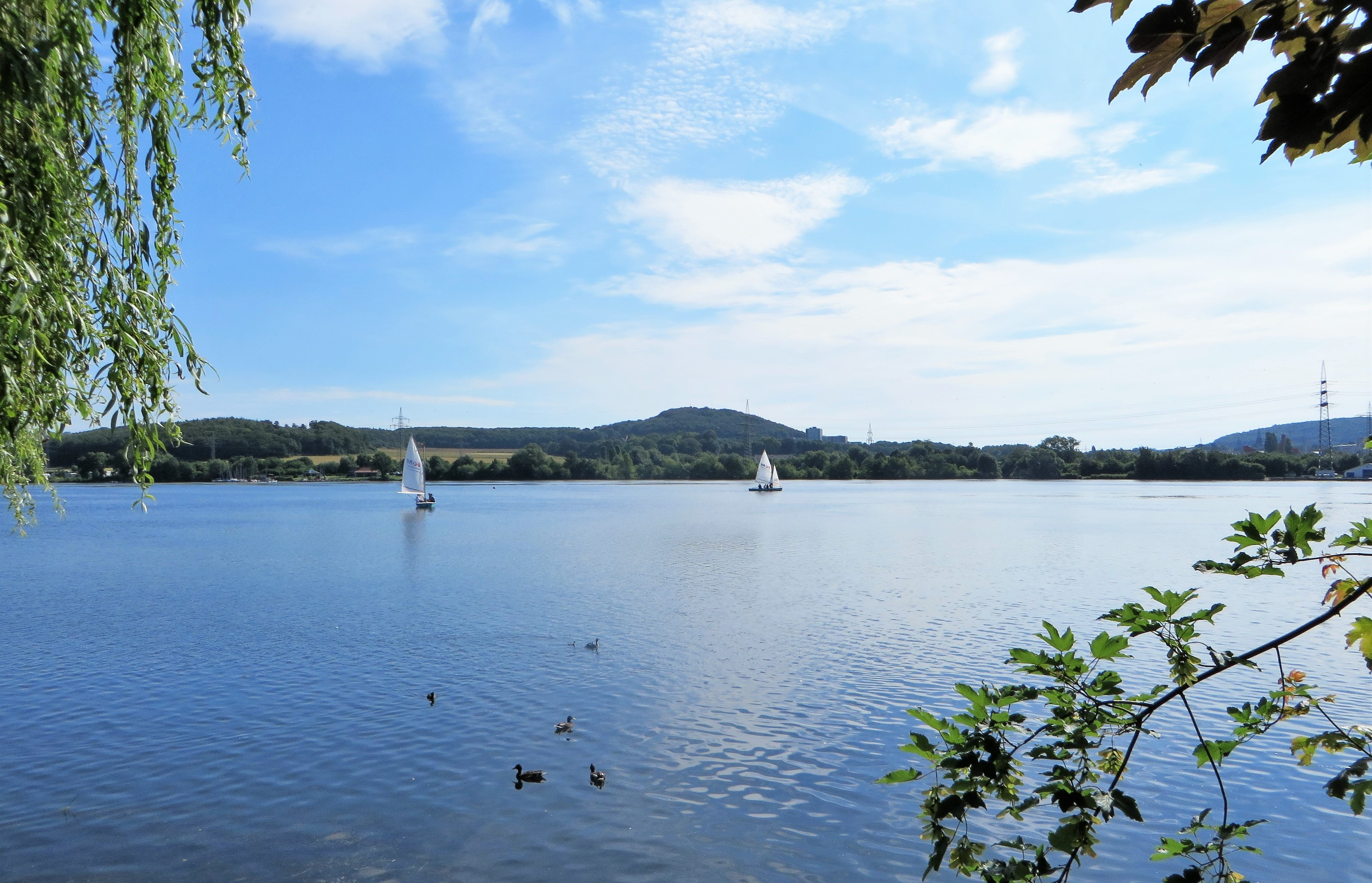 Naturschutzgebiet HA-010 „Ehemaliger Yachthafen Harkortsee“ in Hagen. Blick vom Strandweg in Wetter über den Harkortsee auf das gegenüberliegende Schutzgebiet. Der Bereich liegt westlich von Werdringen am Ostufer des Harkortsees (Foto: vom rechten Strommasten bis in Höhe des linken Segelbootes). Es umfaßt zwei ehemalige, miteinander verbundene Hafenbecken, die mit dem Harkortsee in Verbindung stehen sowie die angrenzenden landwirtschaftlich genutzten Flächen. Im Hintergrund sieht man in der Mitte den Kaisberg (185 m).